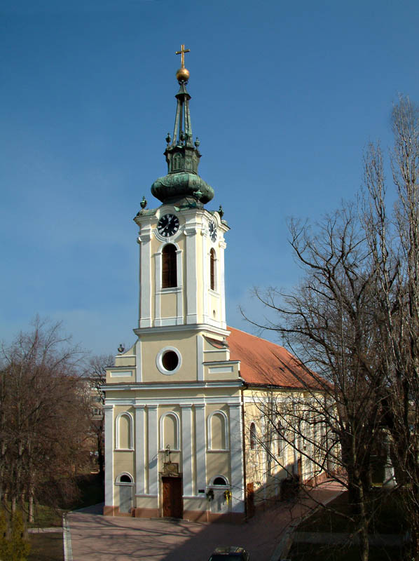 Crkva Svetog Save